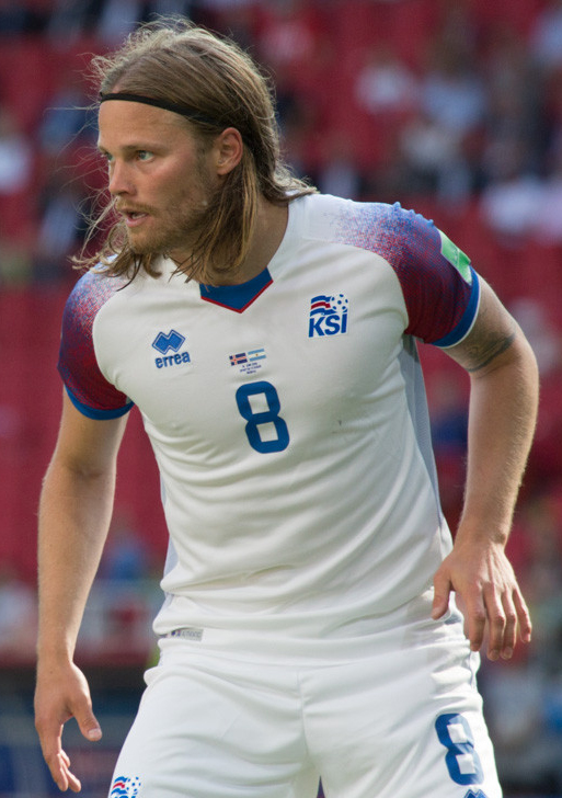 Месси и Ко не смогли обыграть неуступчивых исландцев